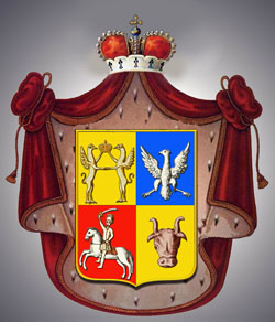 Герб рода князей Трубецких